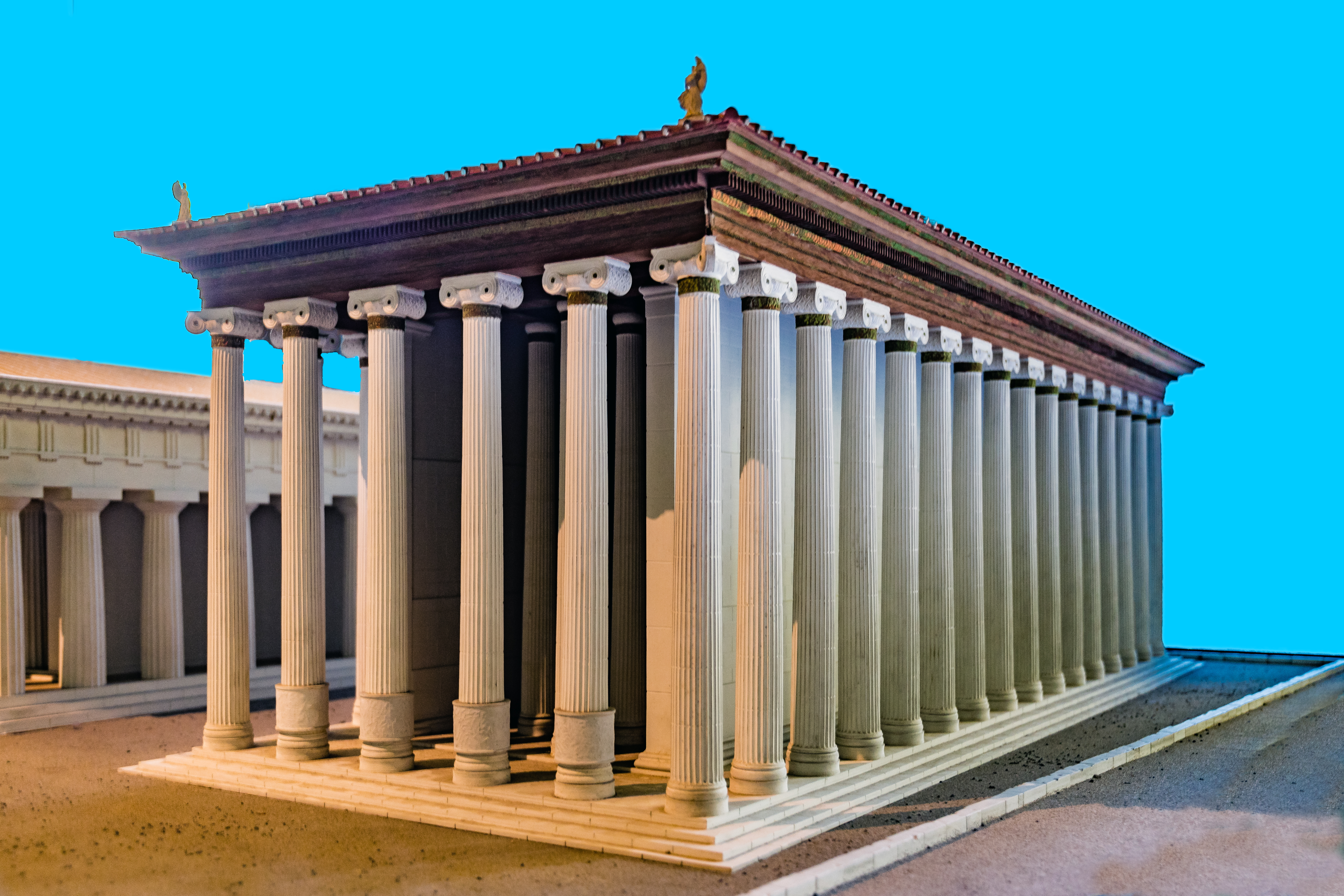 Modellrekonstruktion vom Artemistempel (Syrakus) im Museo Paolo Orsi